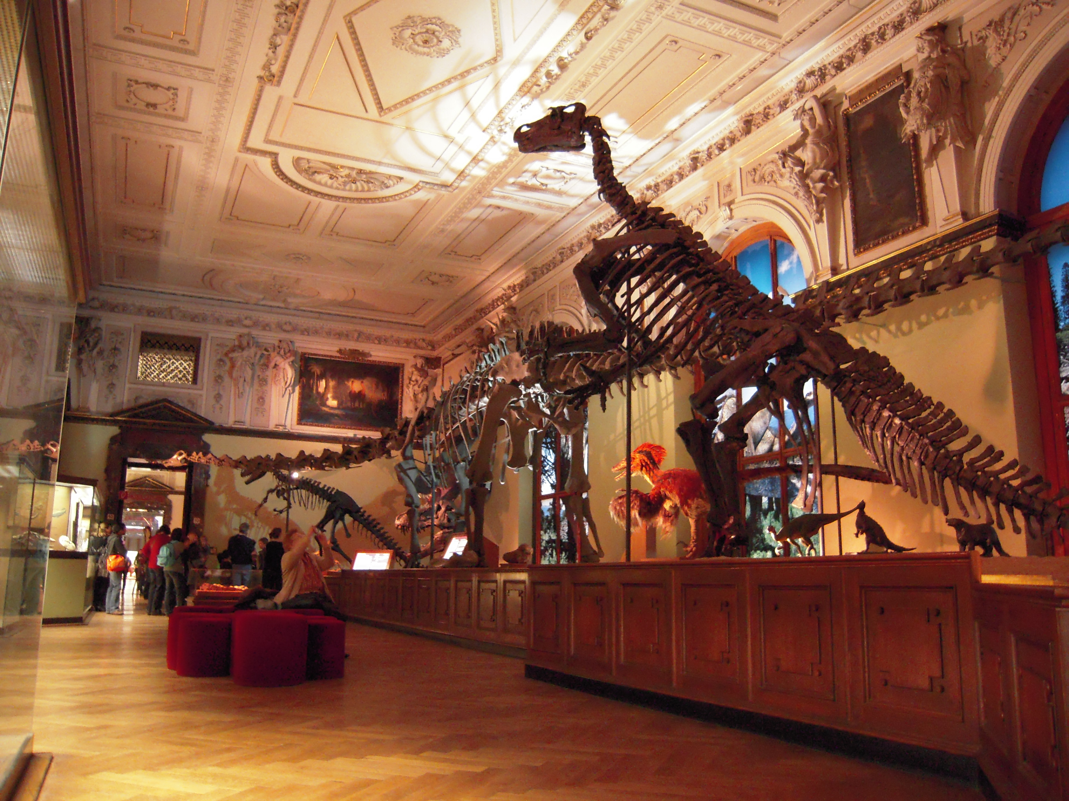 Der Sauriersaal in der Geologisch-Paläontologischen Abteilung des Naturhistorischen Museums Wien.